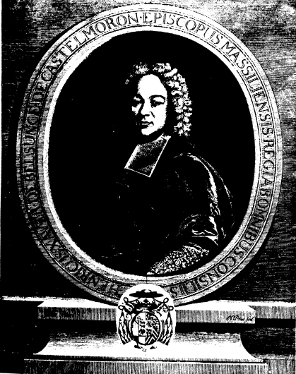 gravure de Belsunce tirée de "Paul Gaffarel et le marquis de Duranty", La Peste de 1720 à Marseille & en France, Perrin et Cie, Paris, 1911.